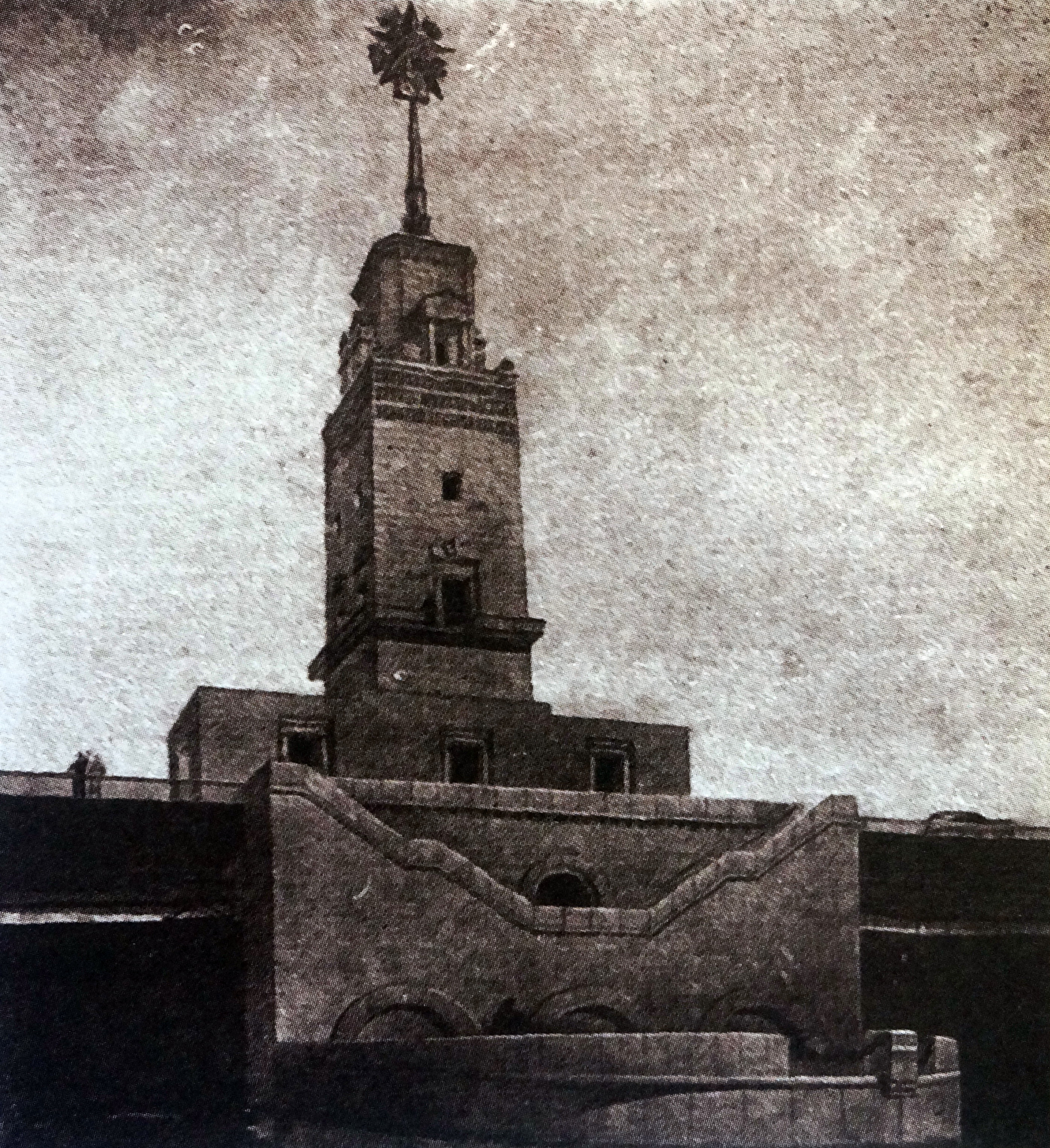 Башня управления нижней головы верхнего шлюза. Ранний проект Жигулёвского гидроузла